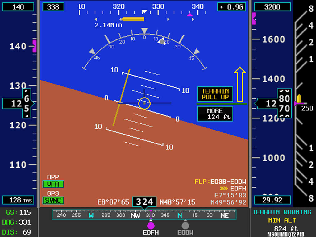 MISOLIMA Q12 Series PFD